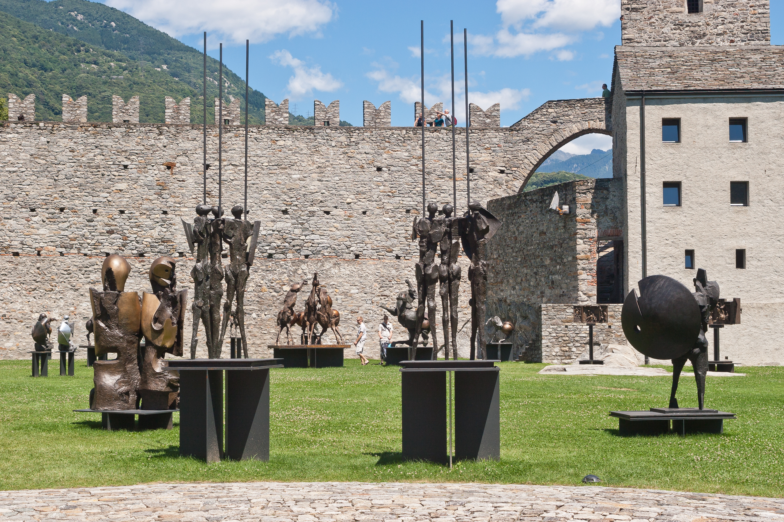 Im Juli 2008 sind Skulpturen des Bildhauers Nag Arnoldi im Castellogrande in Bellinzona aufgestellt